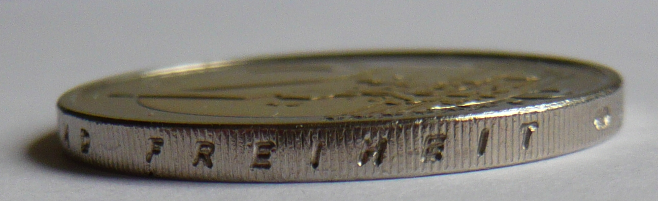 Rand einer Deutschen 2-EUR-Münze